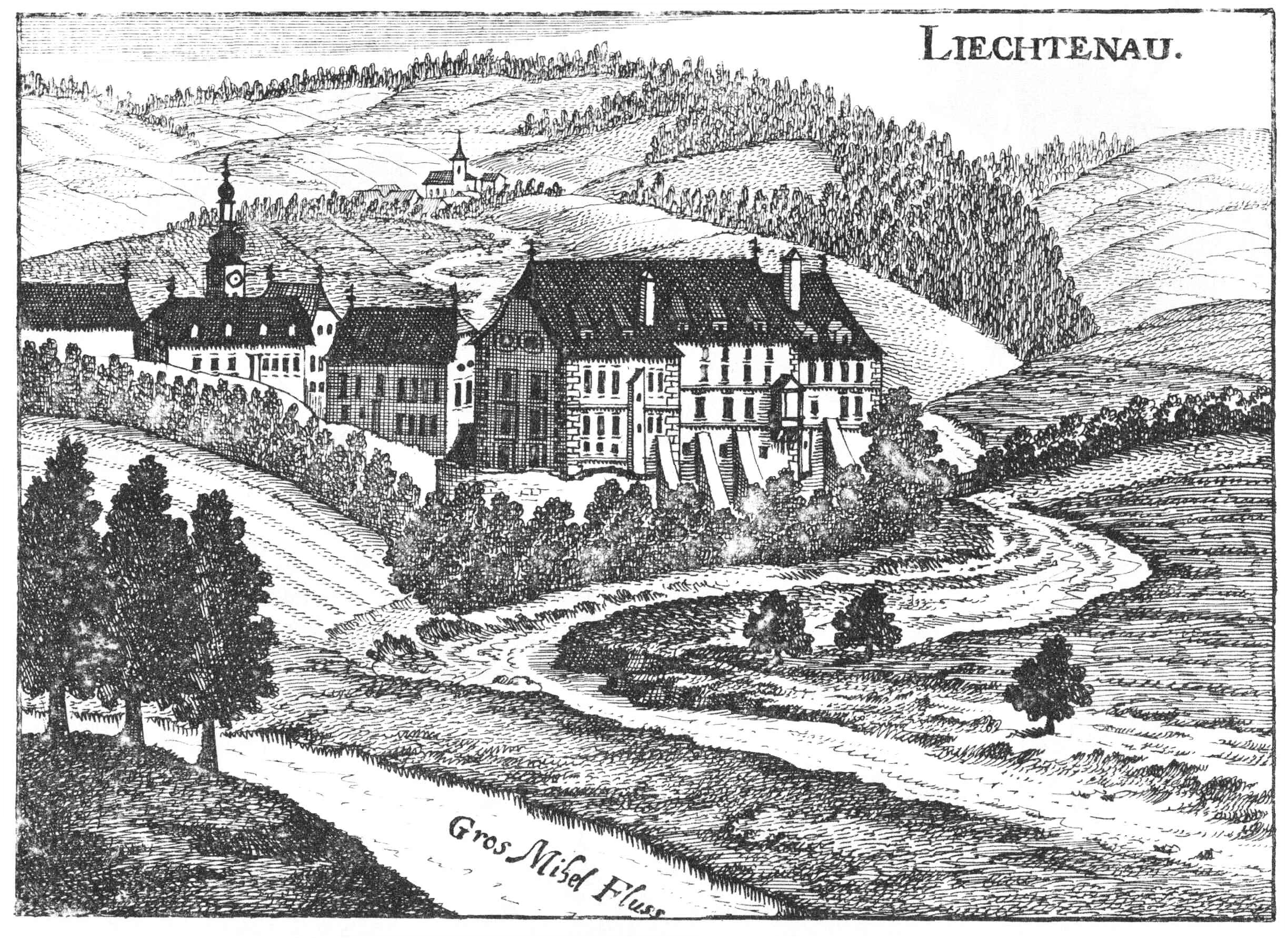 Schloss Lichtenau nach einem Stich von Georg Matthäus Vischer von 1674